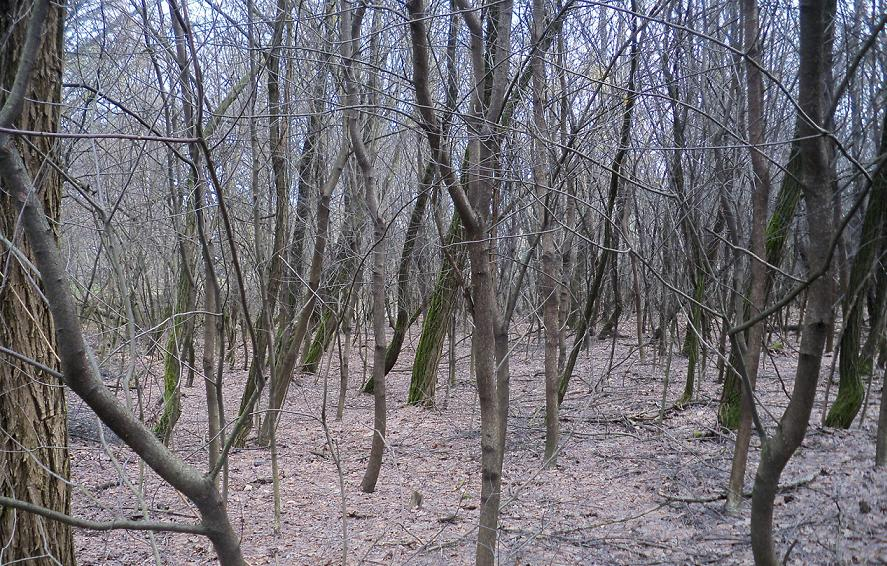 Bosco di robinia e ciliegio tardino nel parco Groane